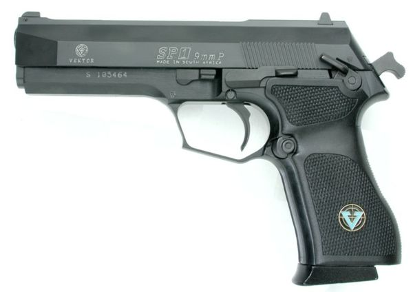 Pistol separa automatik Vektor SP1.